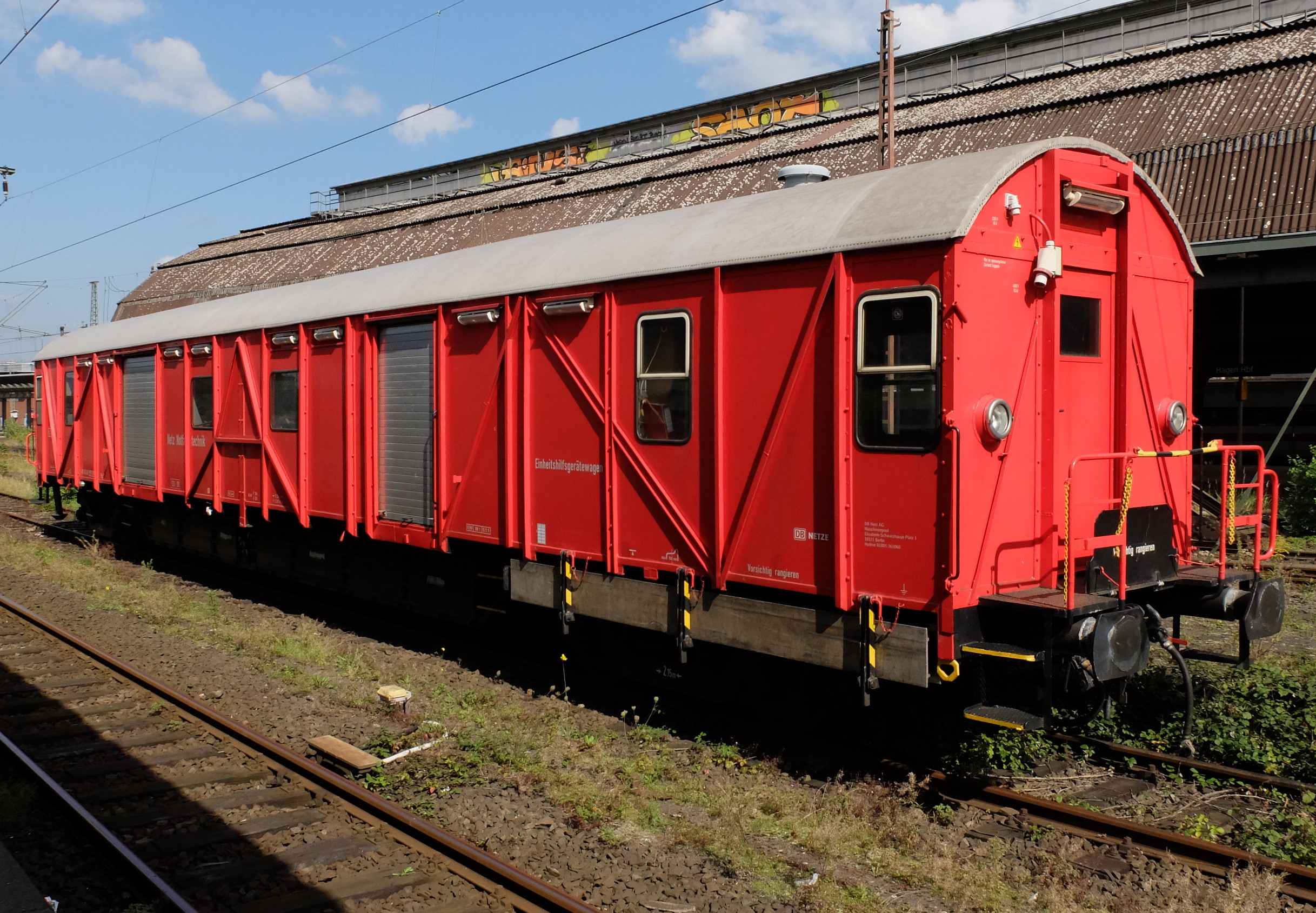 Einheits-Hilfsgerätewagen (Ehg388)